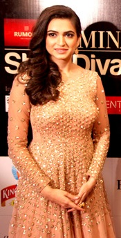 Kharbanda at 'Femina Style Diva 2014'